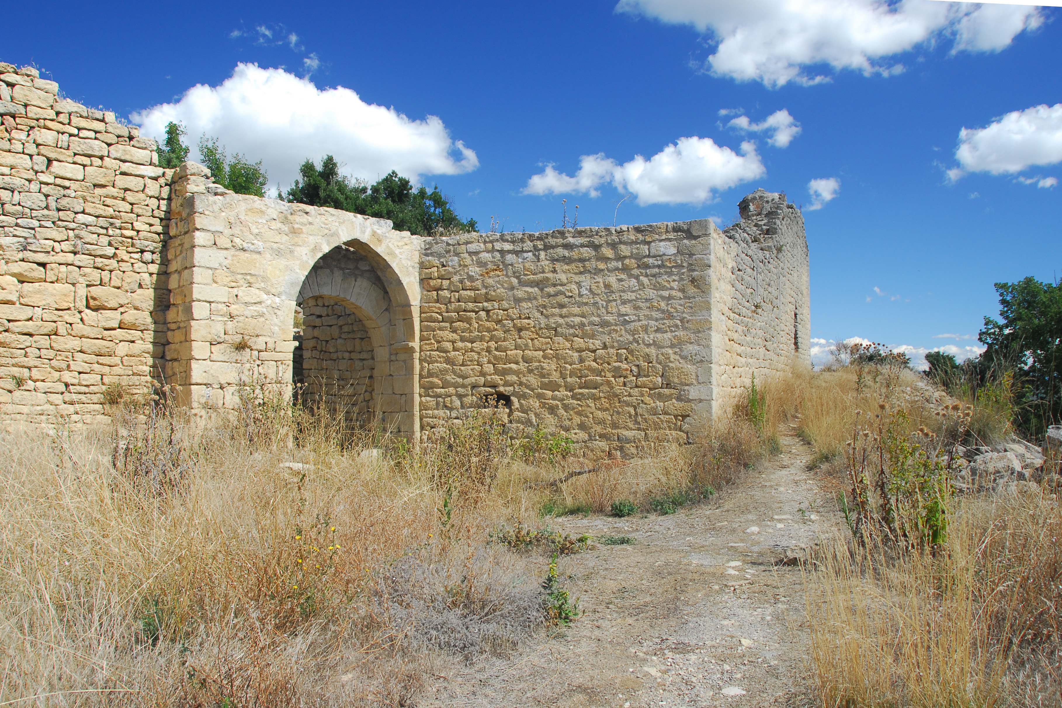 Prieuré de Ganagobie, Villevieille, Wehrmauer mit Tor